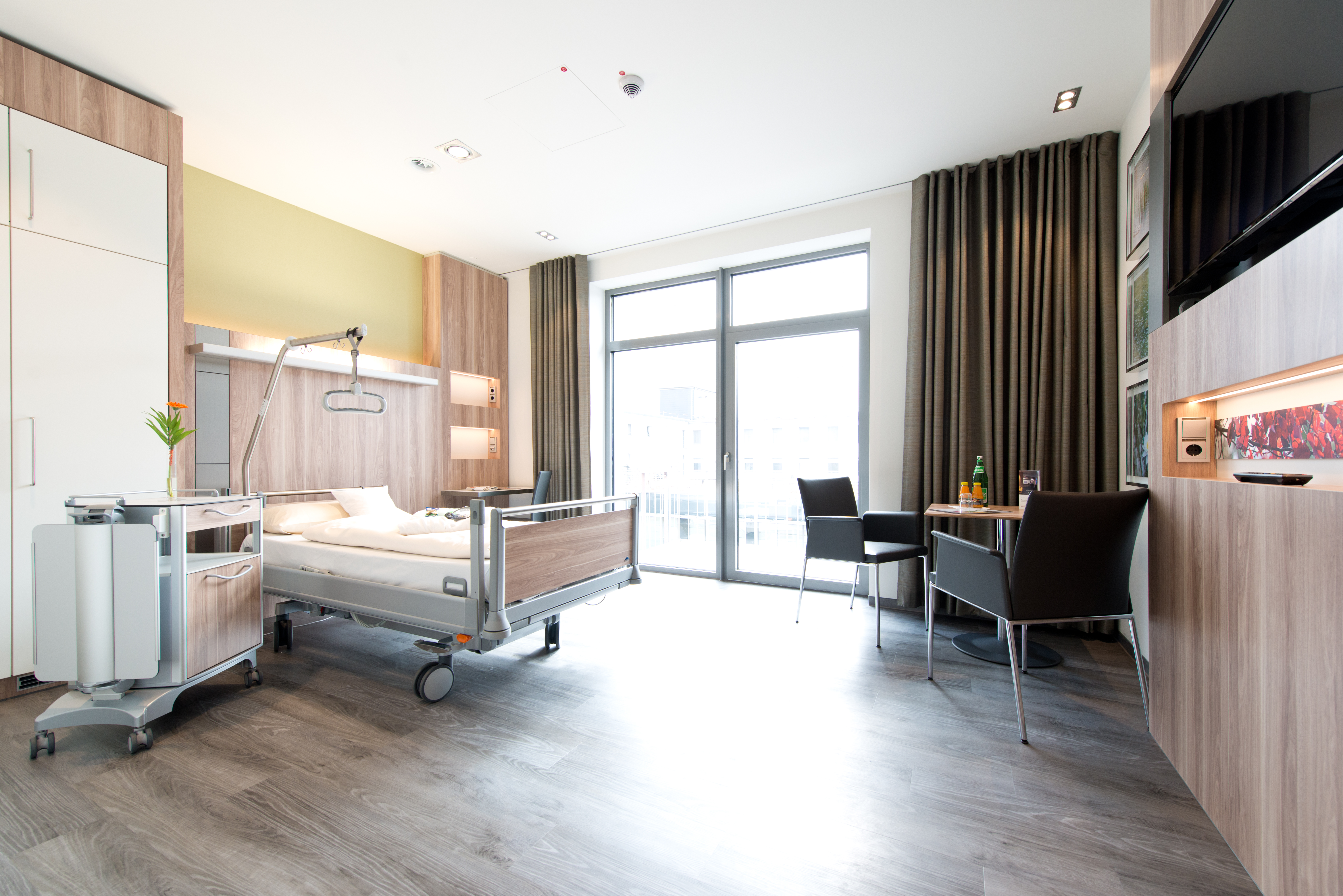 Zimmer auf den 2018 eröffneten Komfortstationen "Prosper" und "Haniel" des Knappschaftskrankenhauses Bottrop